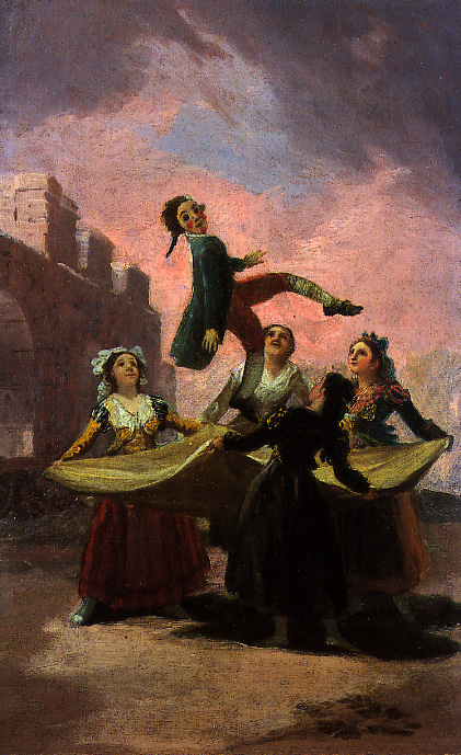 Boceto. Cartones para tapices